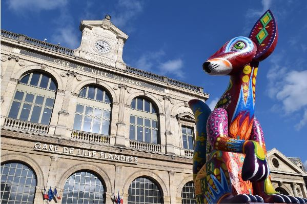 Un des dix alebrijes veille devant la gare Lille Flandres. Créatures fantastiques issues de l’imaginaire de Pedro Linares López en 1936, les alebrijes sont des statues en bois ou papier mâché. La Rue Faidherbe accueille dix de ces sculptures monumentales, réalisées en partenariat avec les artisans du Musée d’Art Populaire de Mexico, la Ville de Mexico (Artsumex), les ateliers El Volador de Mexico et lille3000